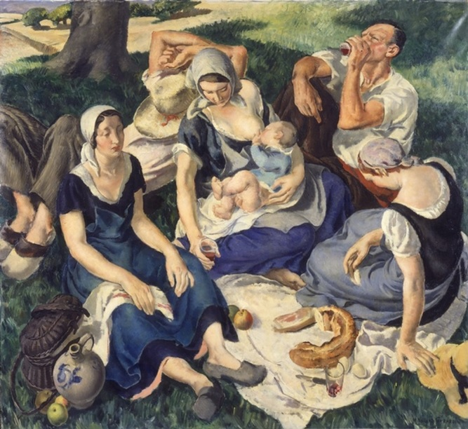 Roland-Marie Gérardin, Le repas de paysans, 1935, Saint-Etienne, musée d'art moderne et contemporain